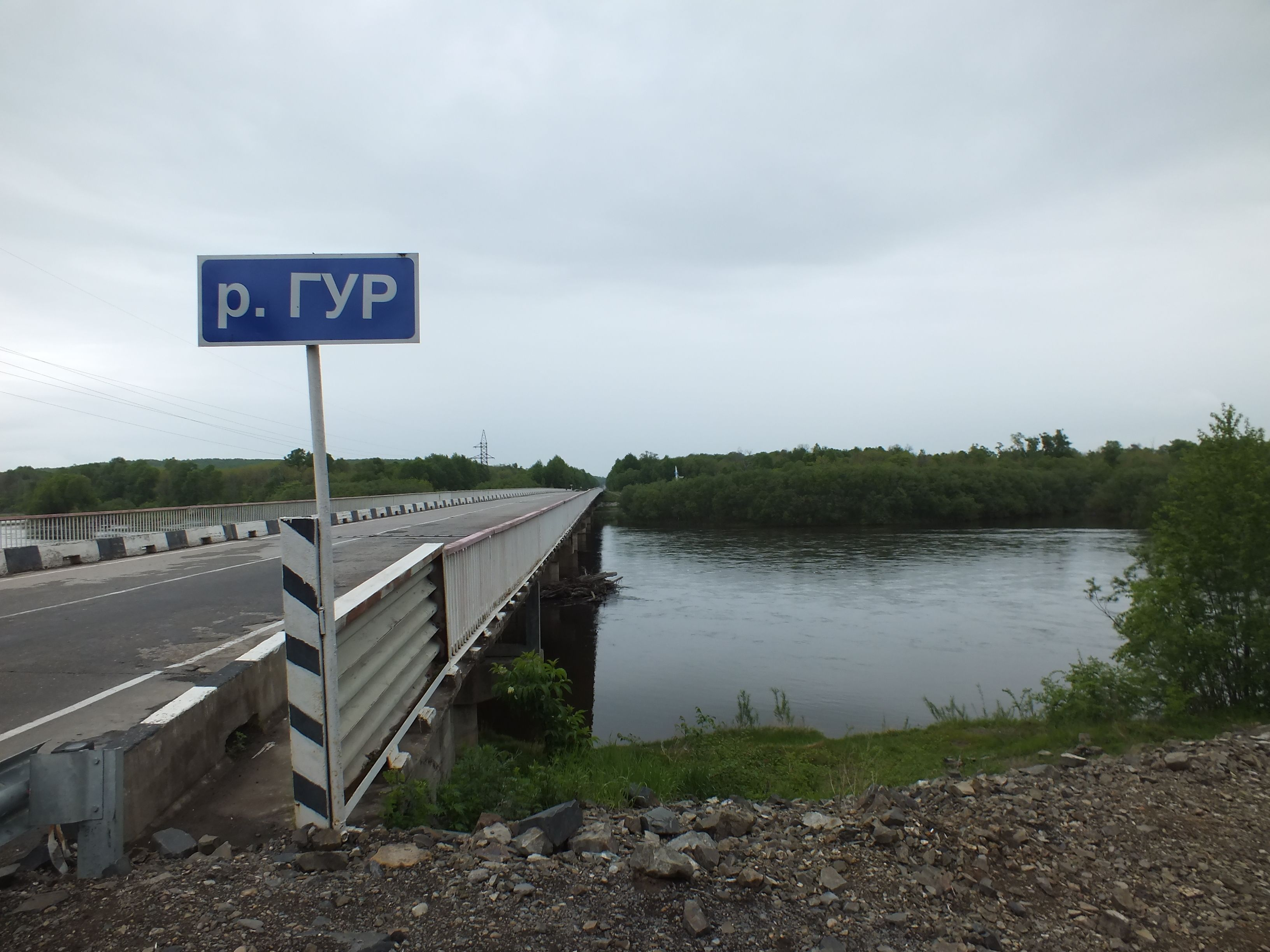 Река Гур, Хабаровский край